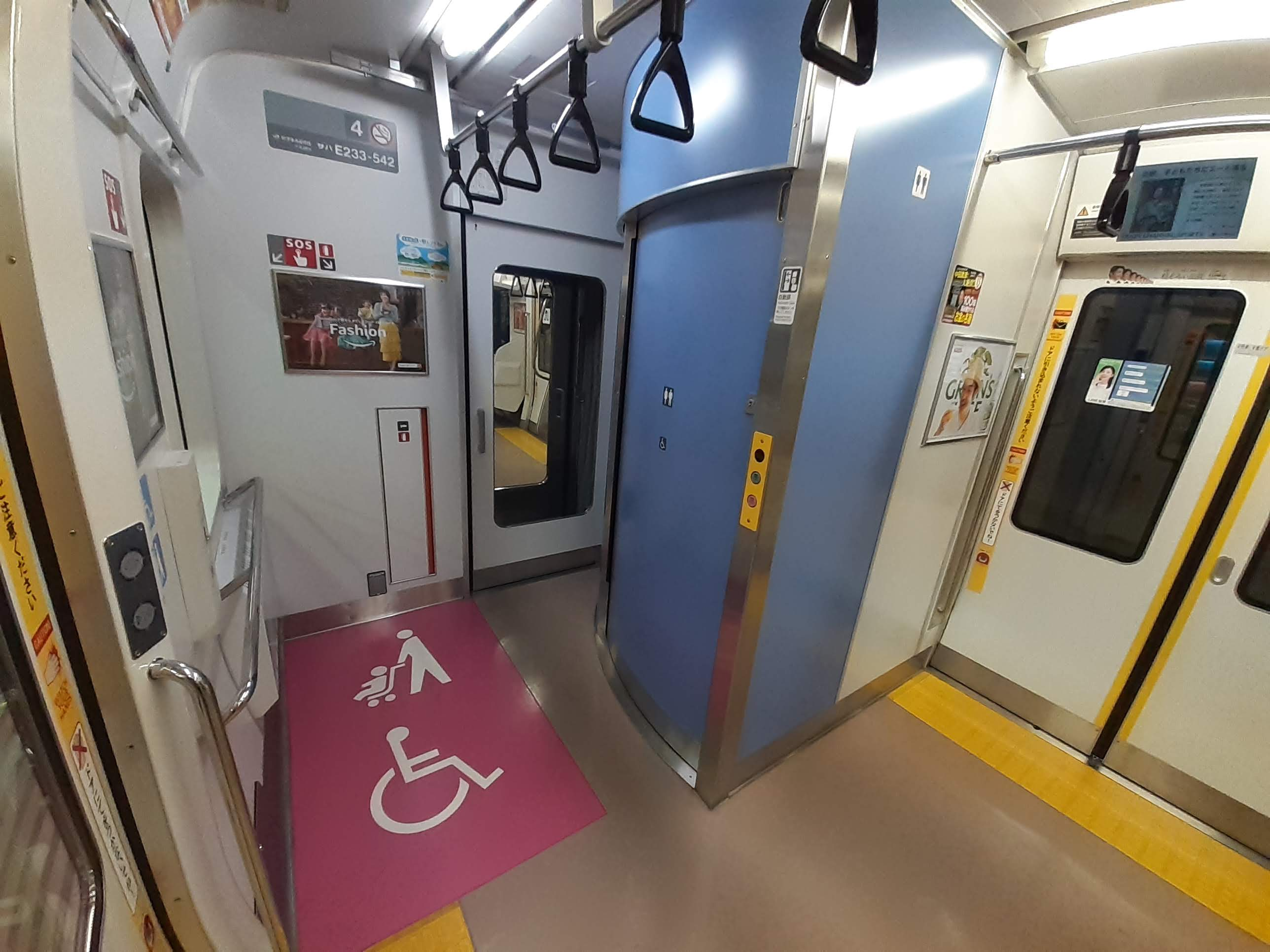 JR東日本E233系電車0番代、車内 トイレ 車椅子スペース